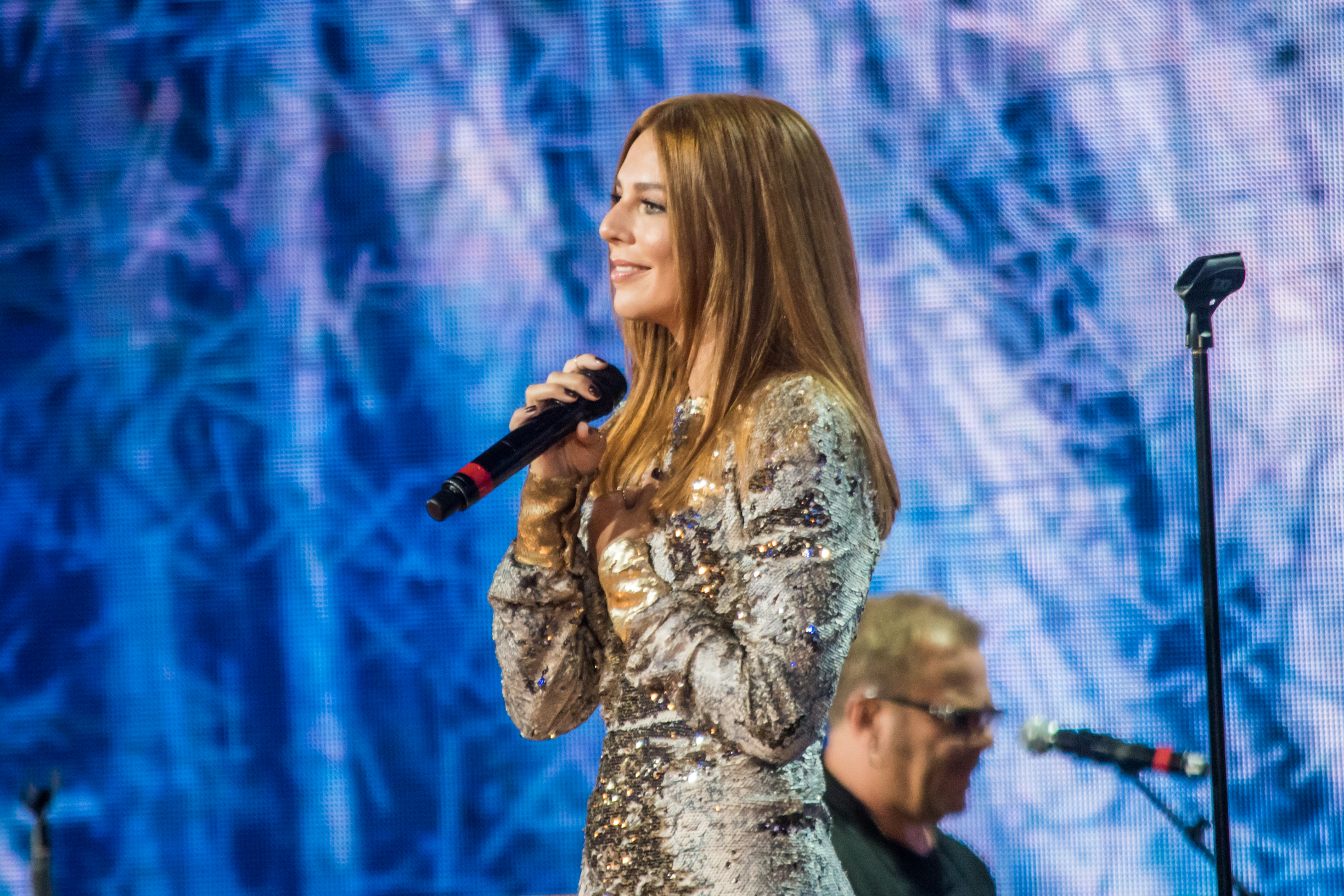 Наталья Подольская на фестивале «Лайма. Рандеву. Юрмала 2017»